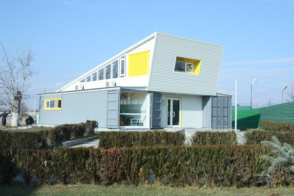 Այբին կից Ֆաբլաբը